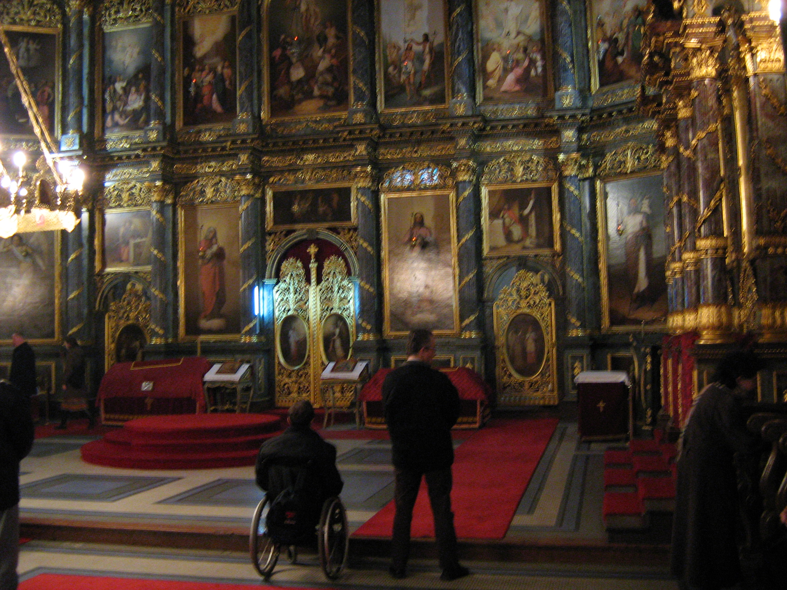 Иконостас, Саборна црква у Београду